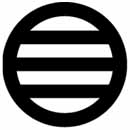 家紋、三つ引き